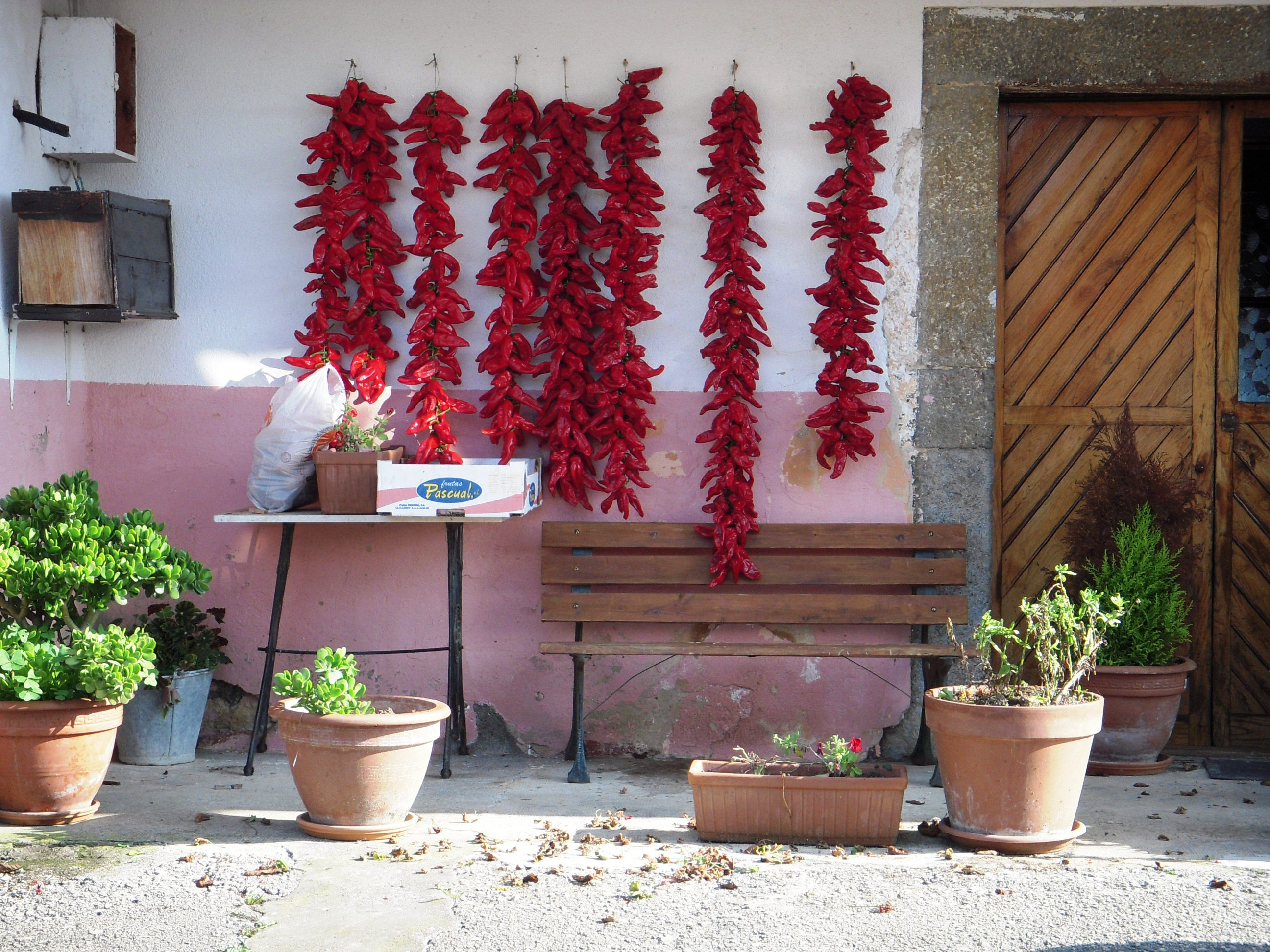 Barrio de Hoz de Marrón